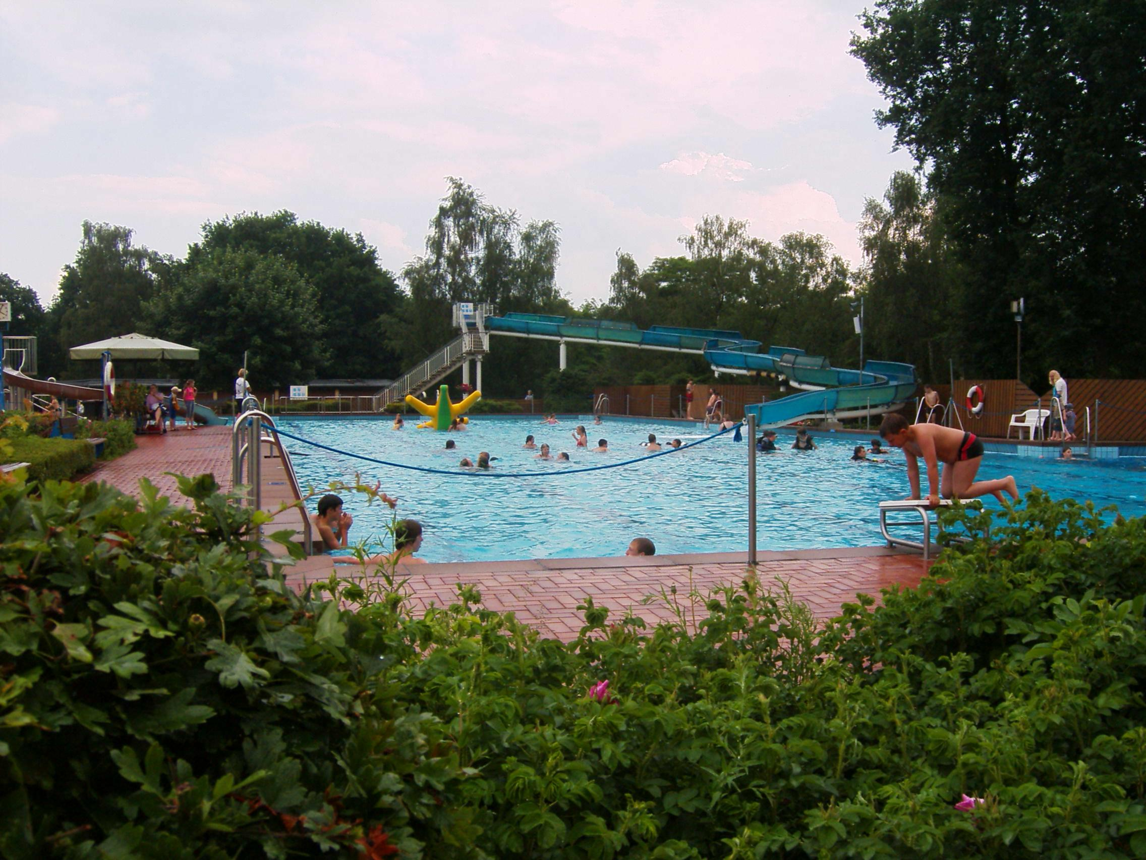 Naturfreibad in Offlum. Neuenkirchen (Kreis Steinfurt), Schwimmbecken mit Solaranlage beheiztem Wasser